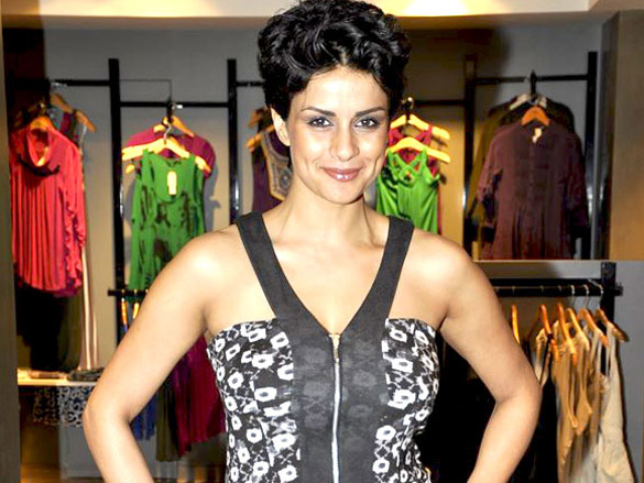 Gul Panag at Anita Dongre's store launch